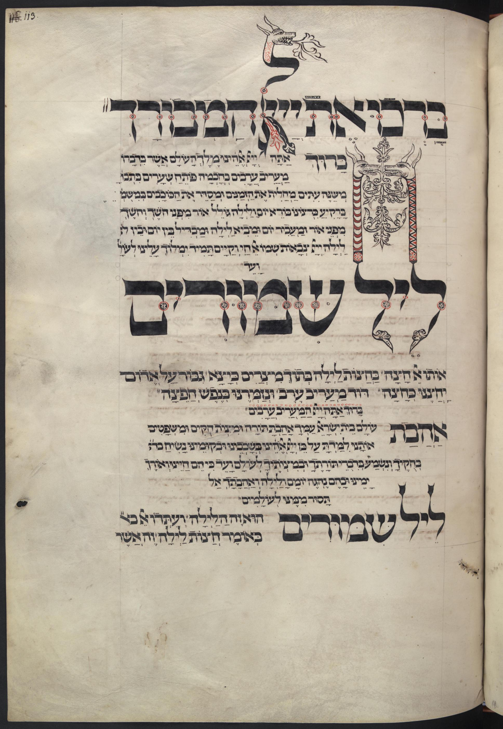 המערבית 'ליל שמורים' ללילה ראשון של פסח, מתוך מחזור אשכנז כת"י דרזדן A.46.a עמוד 113א, עם ציורים ועיטורים בכותרות